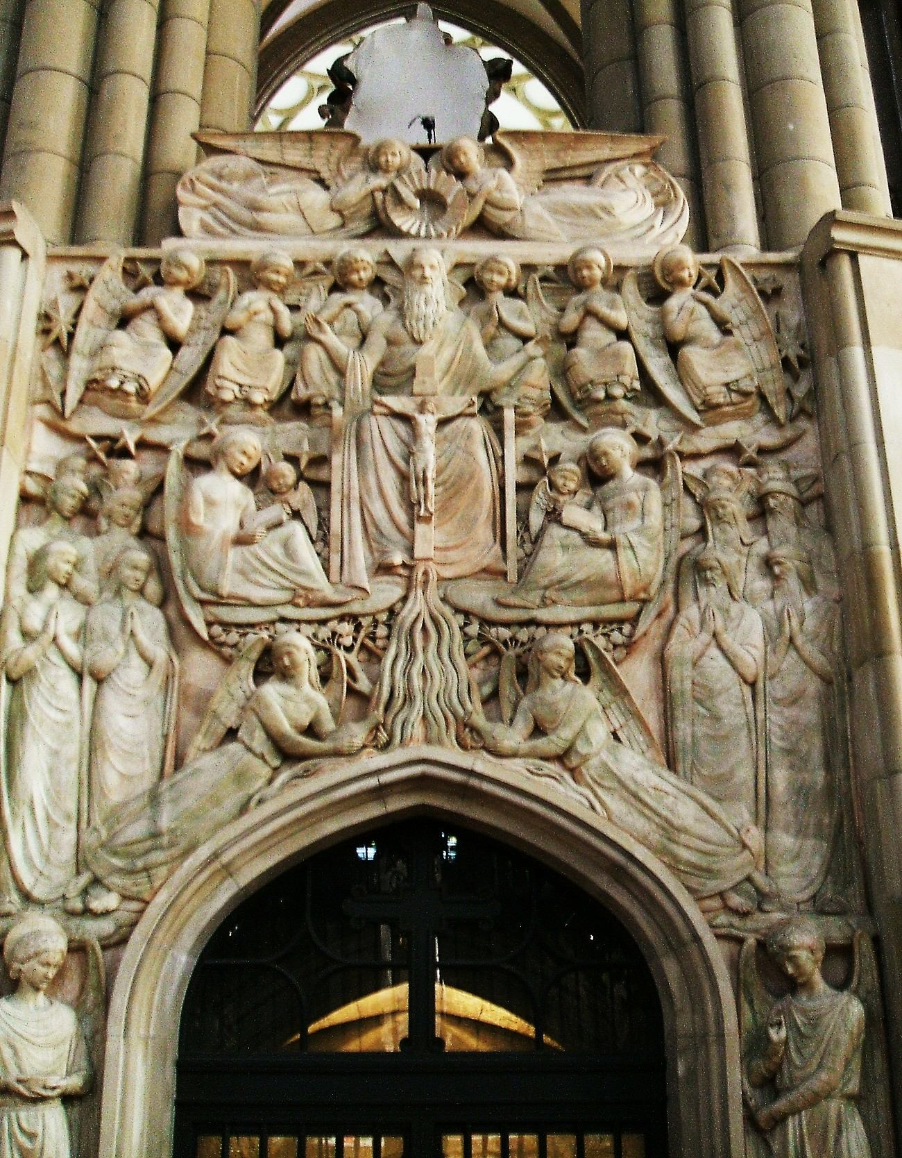 Relieve de la Puerta del Paraíso, trasaltar de la Catedral Nueva de Vitoria-Gasteiz